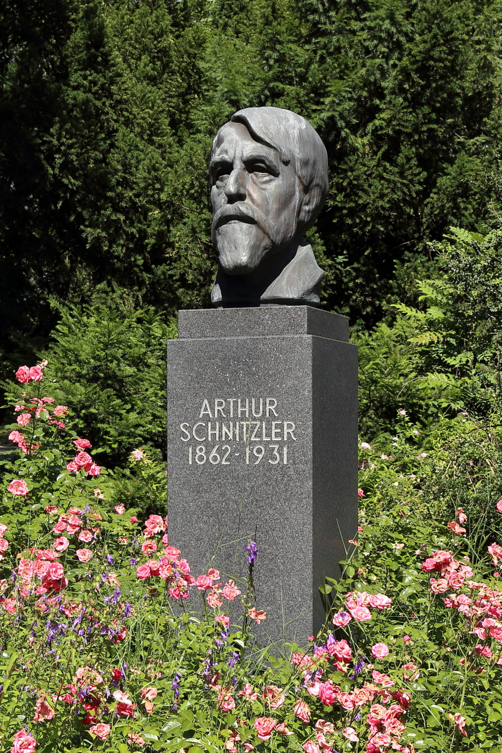 Das Arthur-Schnitzler-Denkmal im Türkenschanzpark im 18. Wiener Gemeindebezirk Währing.Die Bronzebüste auf Marmorsockel schuf Paul Peschke und wurde am 13. Mai 1982 enthüllt.